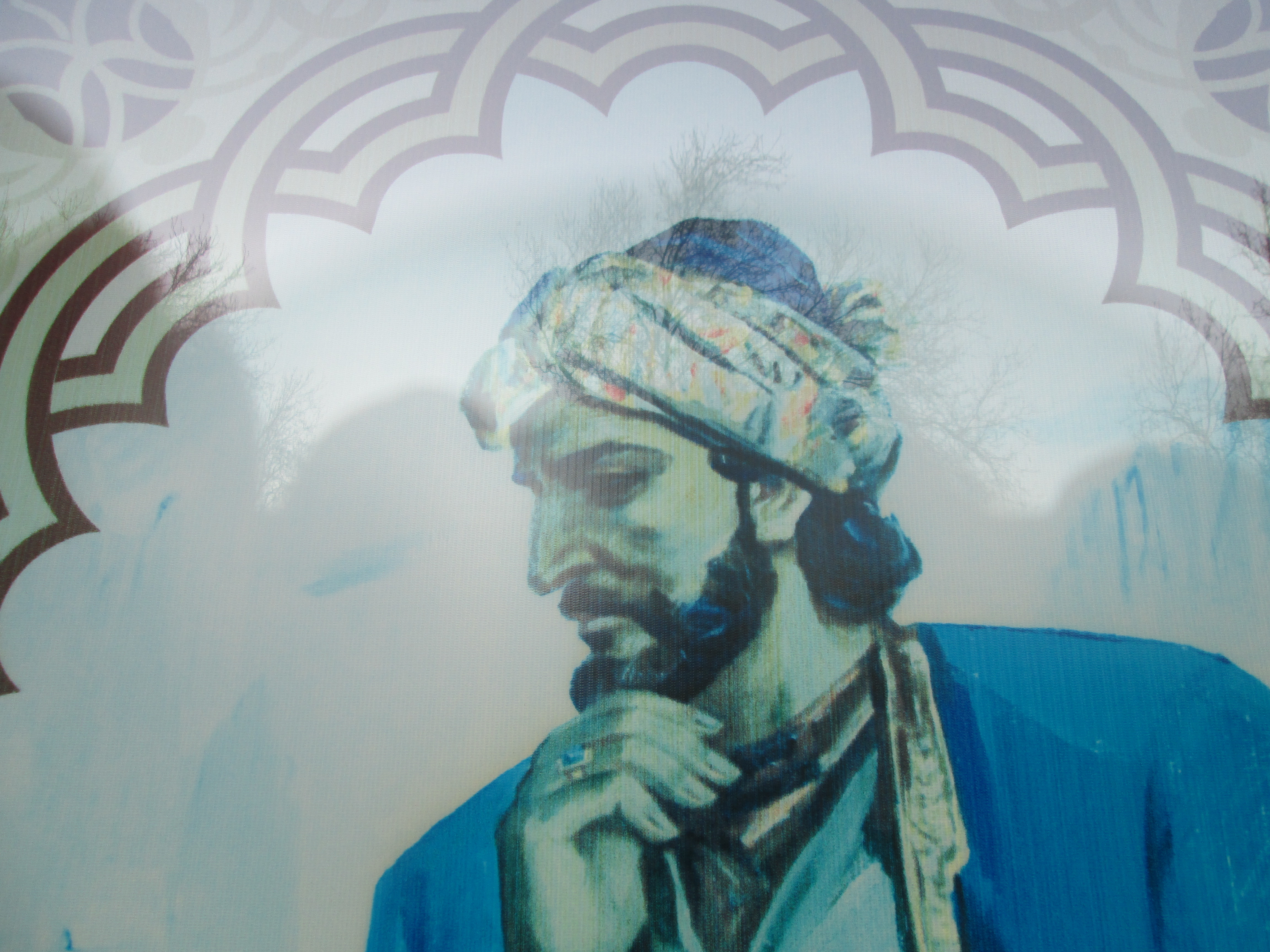 Nizami adına Ədəbiyyat Muzeyinin binasının pəncərəsində